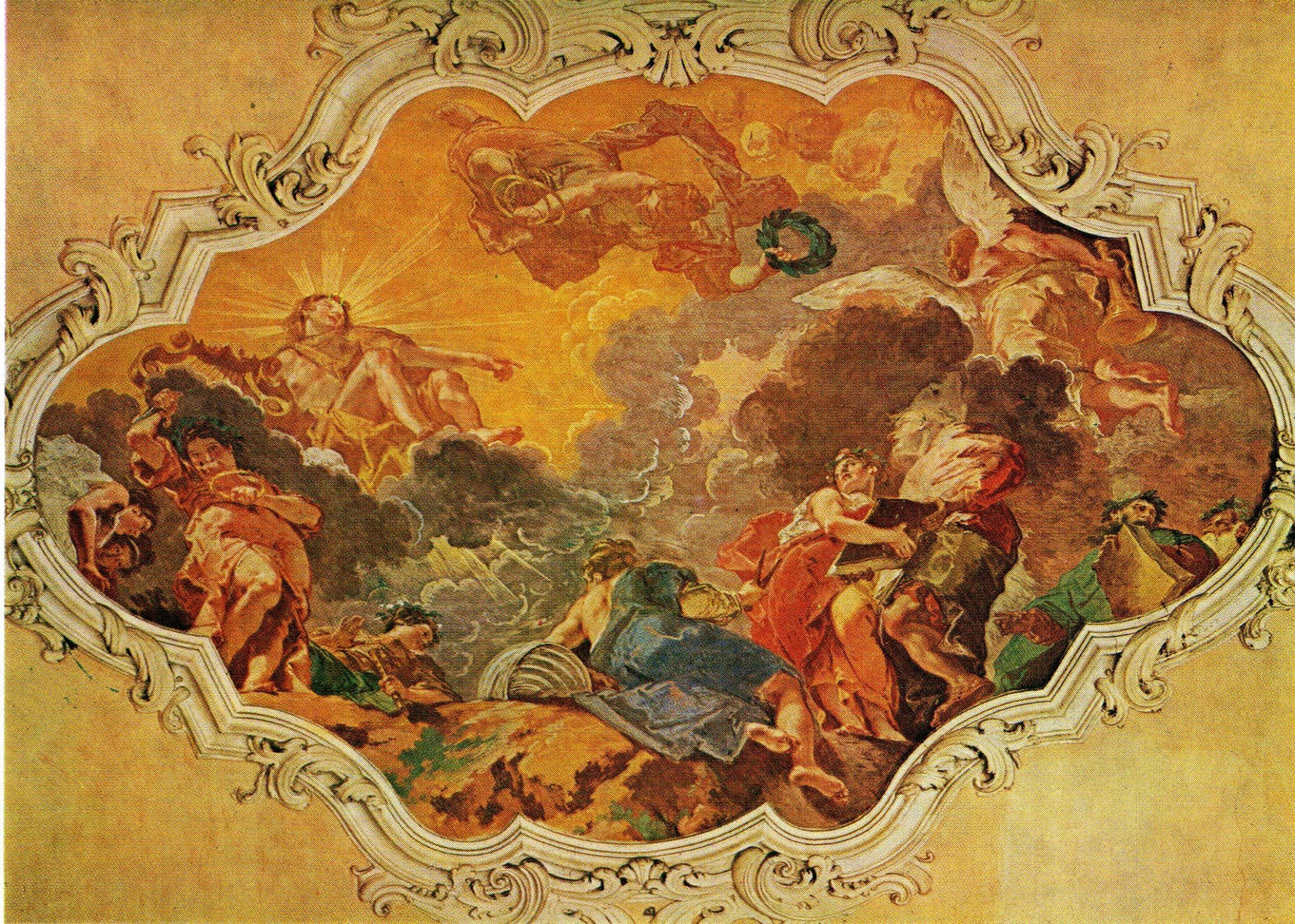 Affesco rappresentante Apollo e le Muse, ad opera di Giuseppe Bazzani, situato a Palazzo Cavriani